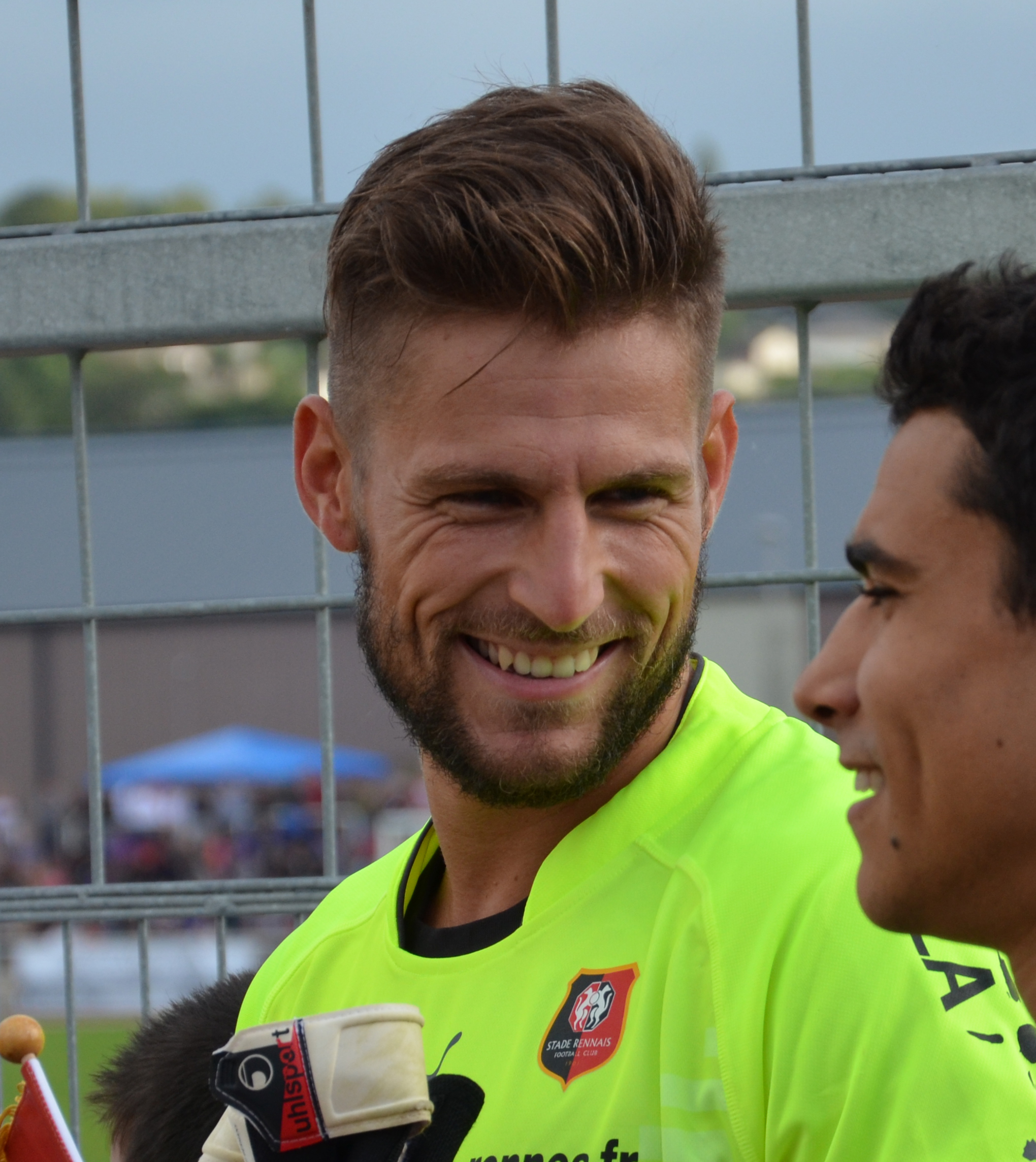 Photographie prise à l'occasion de la rencontre amicale opposant le Stade Malherbe de Caen au Stade rennais, le 9 juillet 2014 au stade Pierre-Comte de Vire. Ici, Benoît Costil.